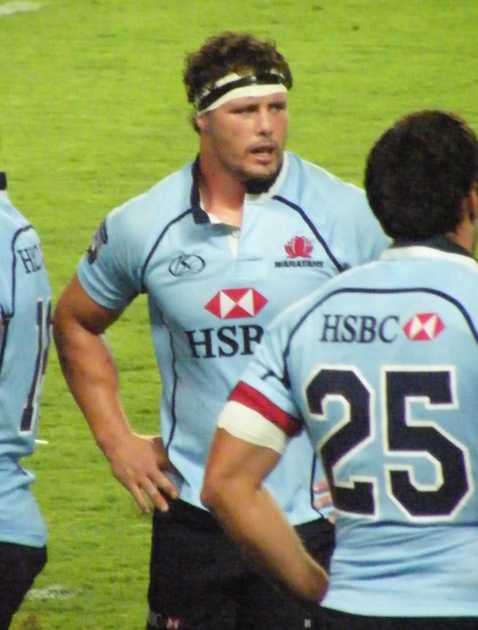 NSW waratahs prop Al Baxter